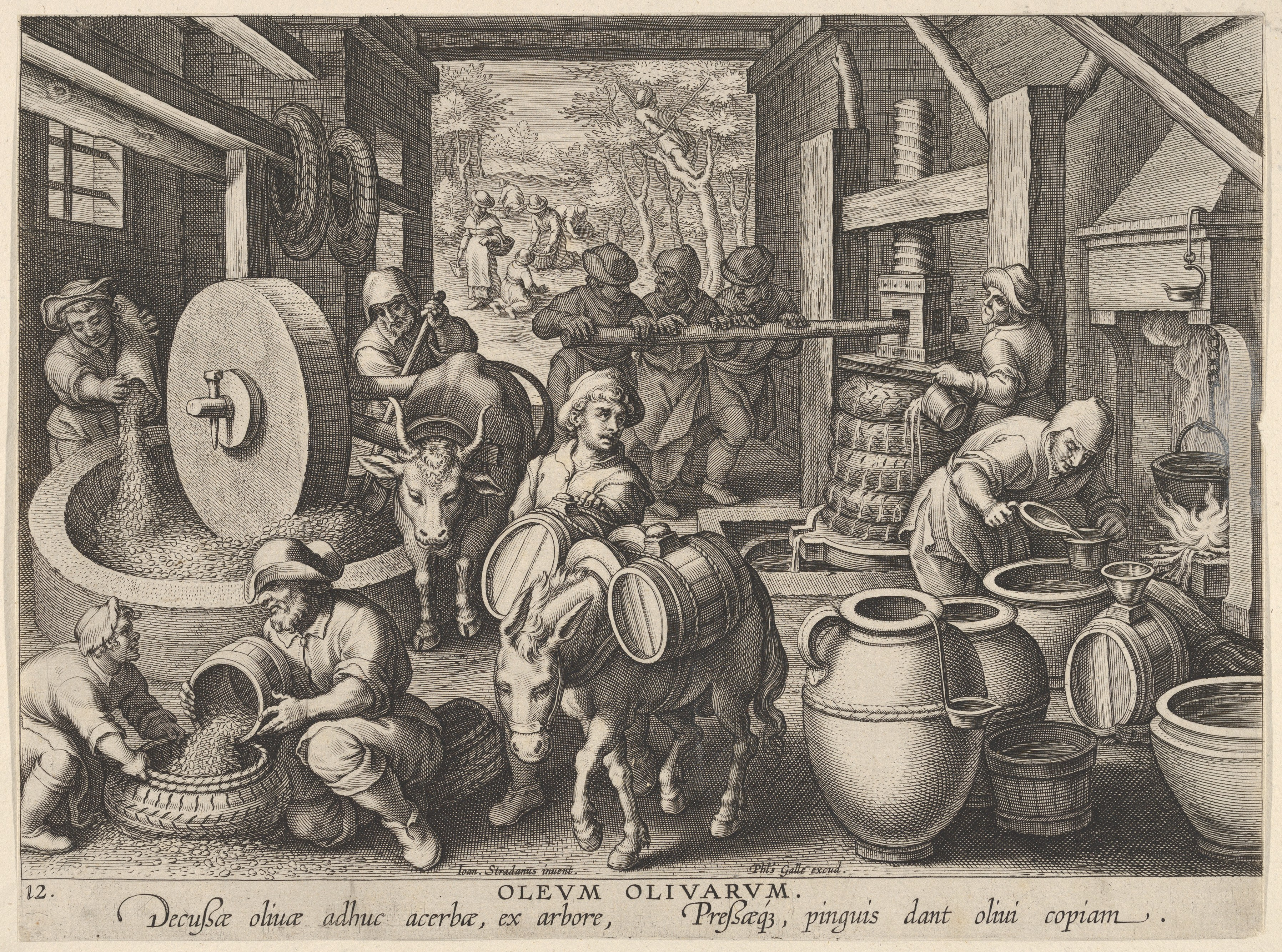 Herstellungsprozess von Olivenöl im 17.Jahrhundert.